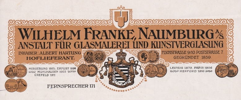 Firmierung als Kaiserlicher Hoflieferant